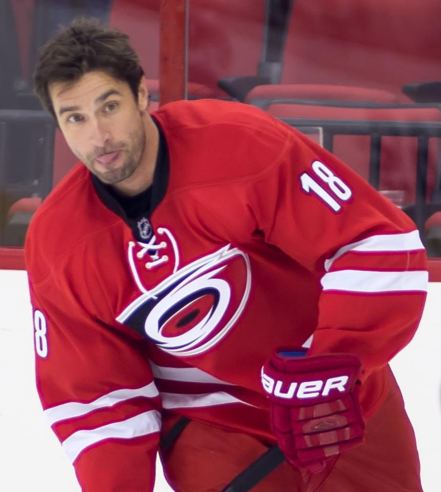 Radek Dvořák, Czech ice hockey player